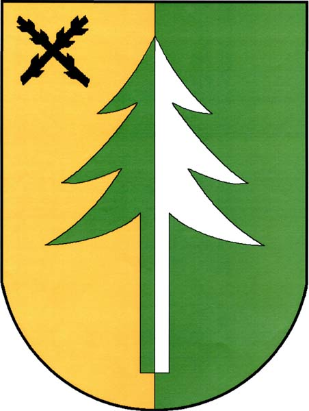 Znak obce Kojetín (okres Havlíčkův Brod)